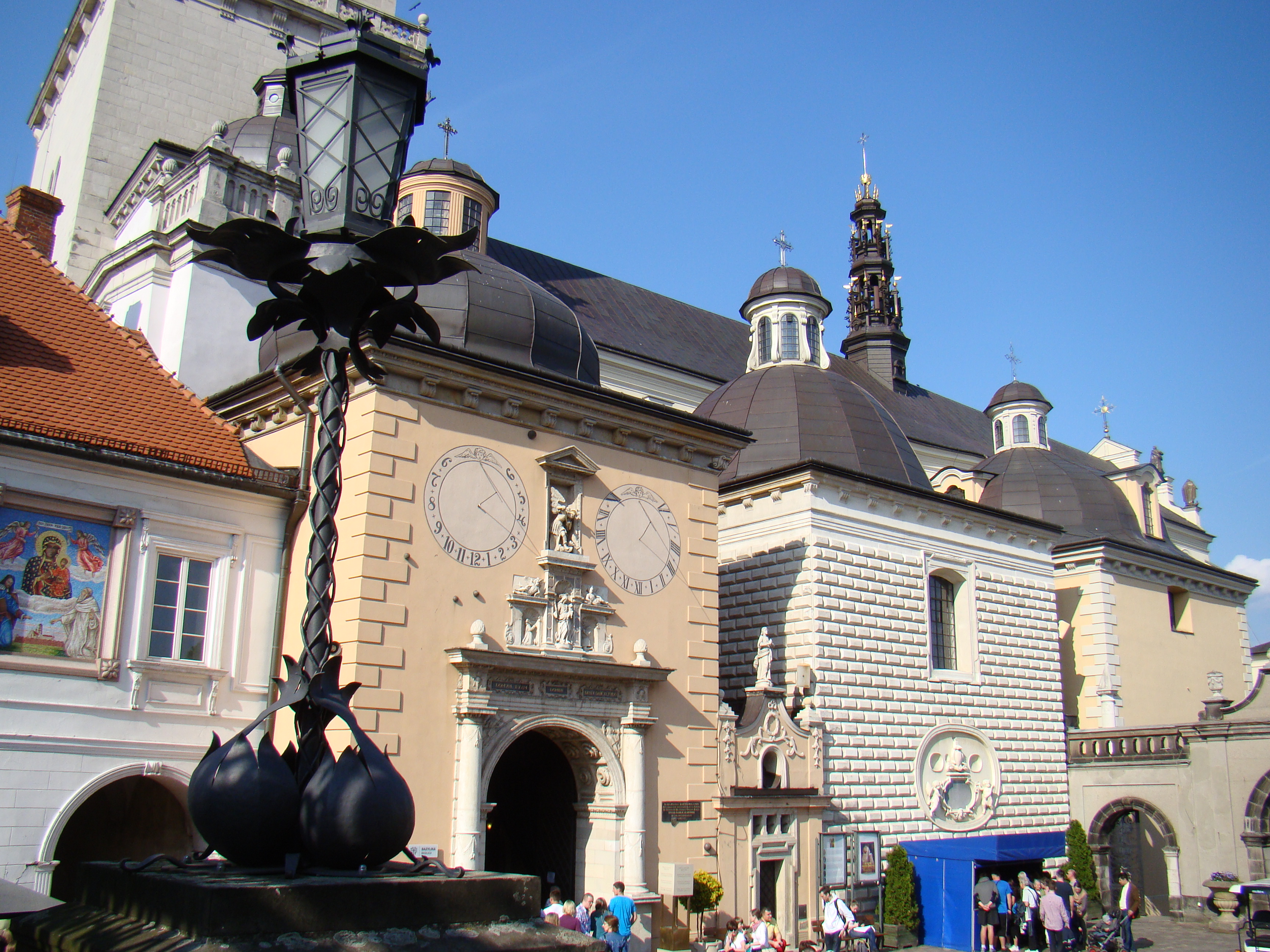 Częstochowa, kościół pw. Wniebowzięcia NMP i Znalezienia Krzyża Św., 1425-1463, 1690-1696